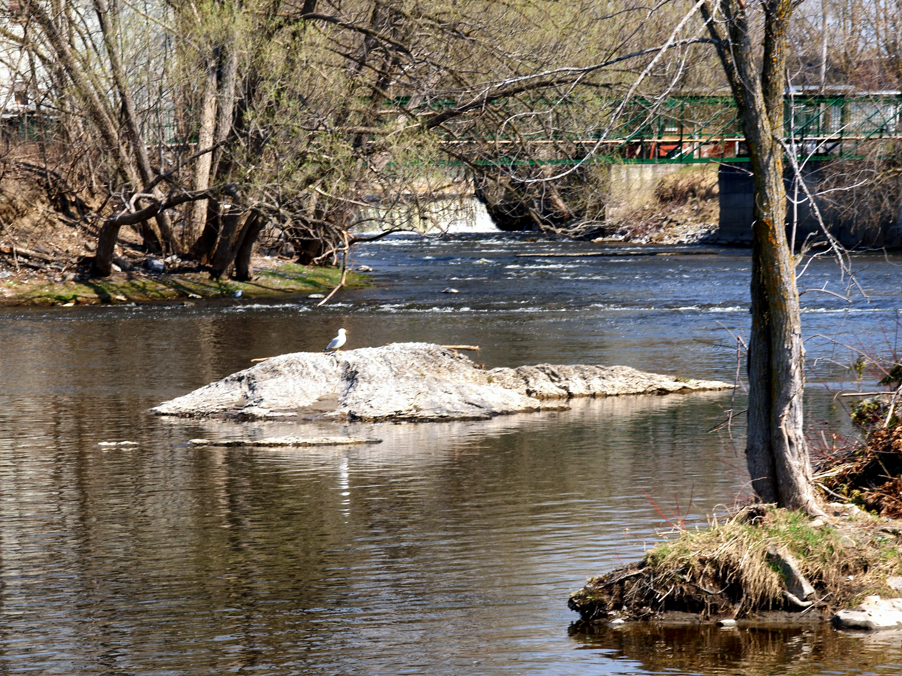 Bedford, Montérégie (Québec) - La rivière aux Brochets